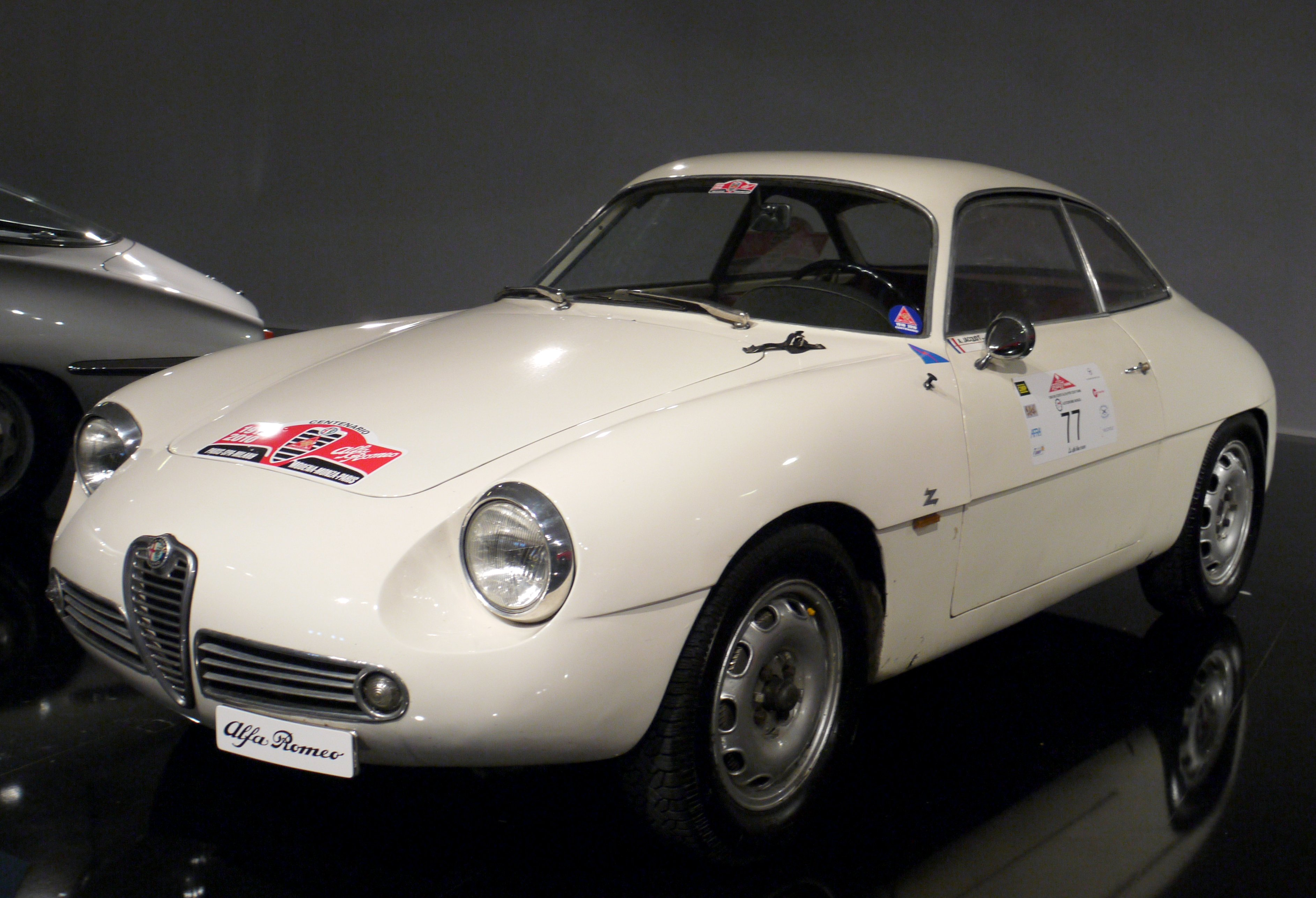 1960-1962 Alfa-Romeo Giulietta SZ by Zagato.